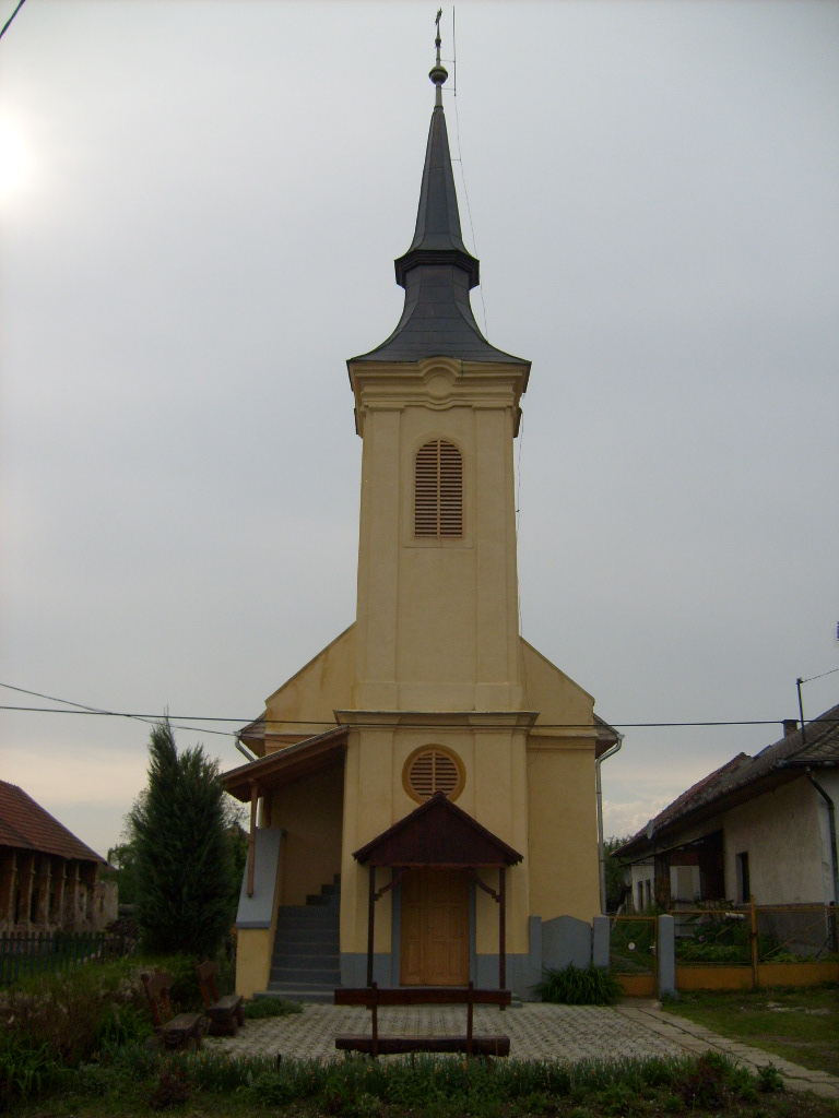 A dubicsányi református templom